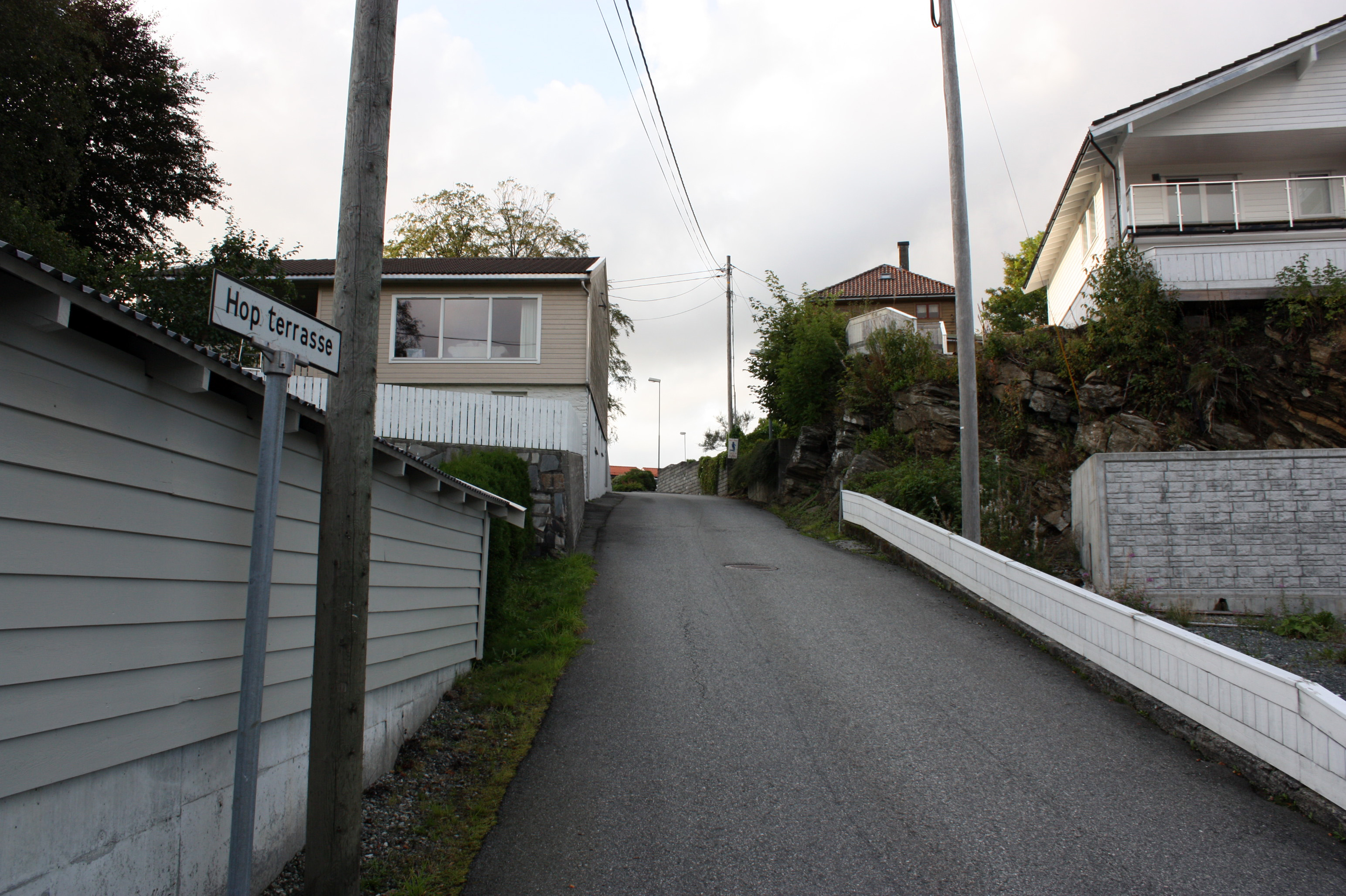 Hop terrasse, Fana, Bergen.